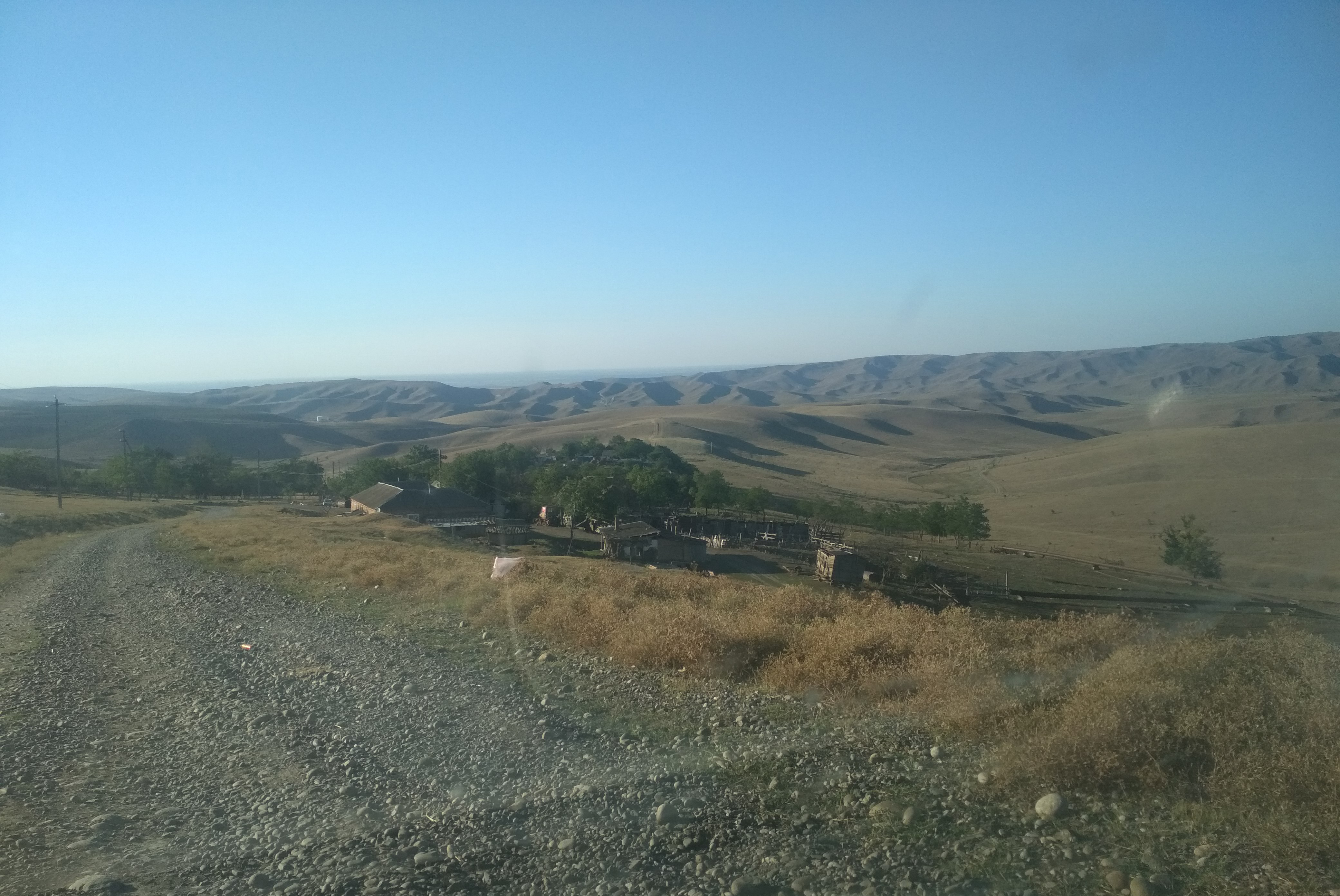 Нохчийн: с.Орлиное вид сверху